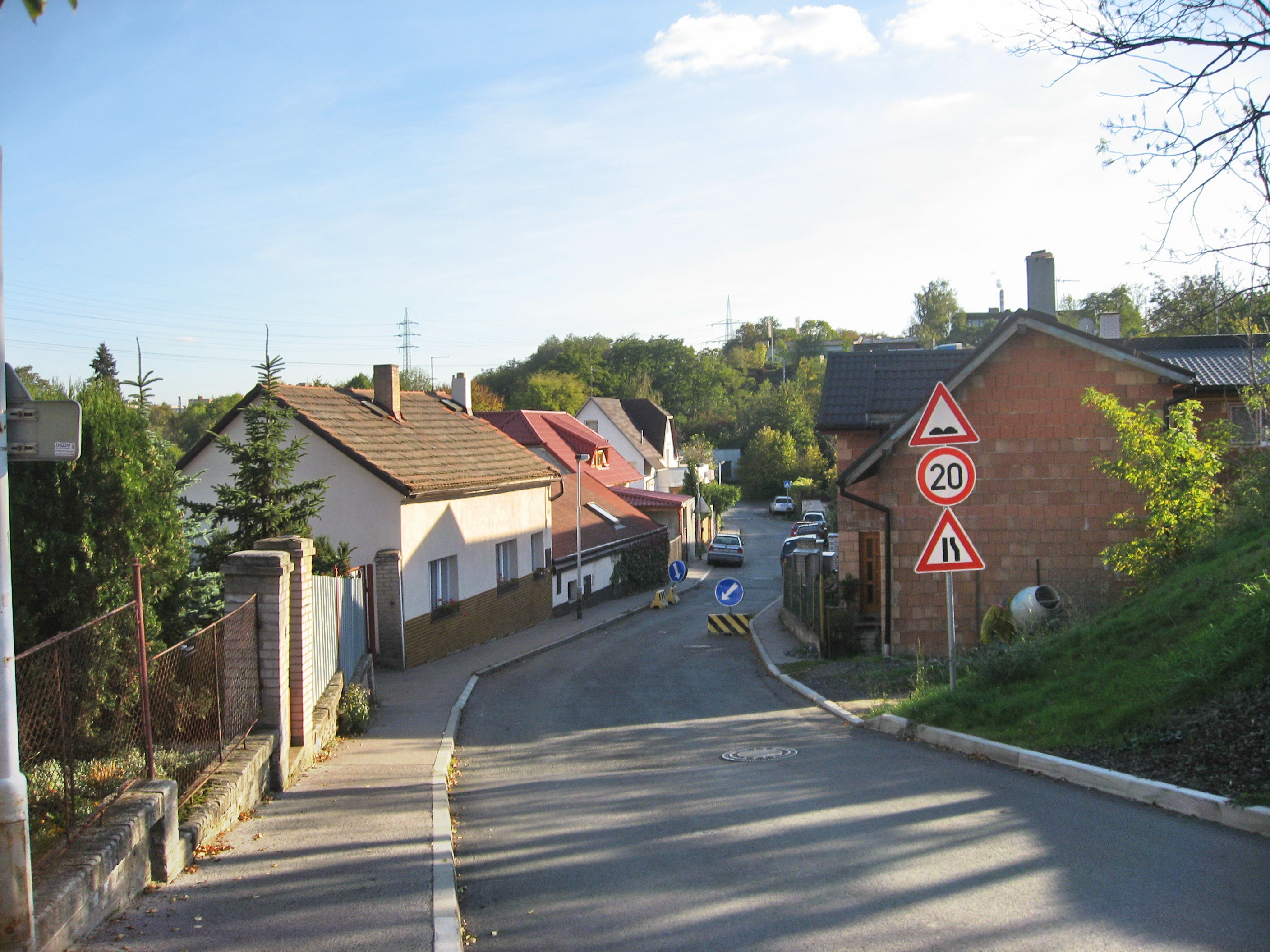 Praha-Kyje, ulice Hodějovská